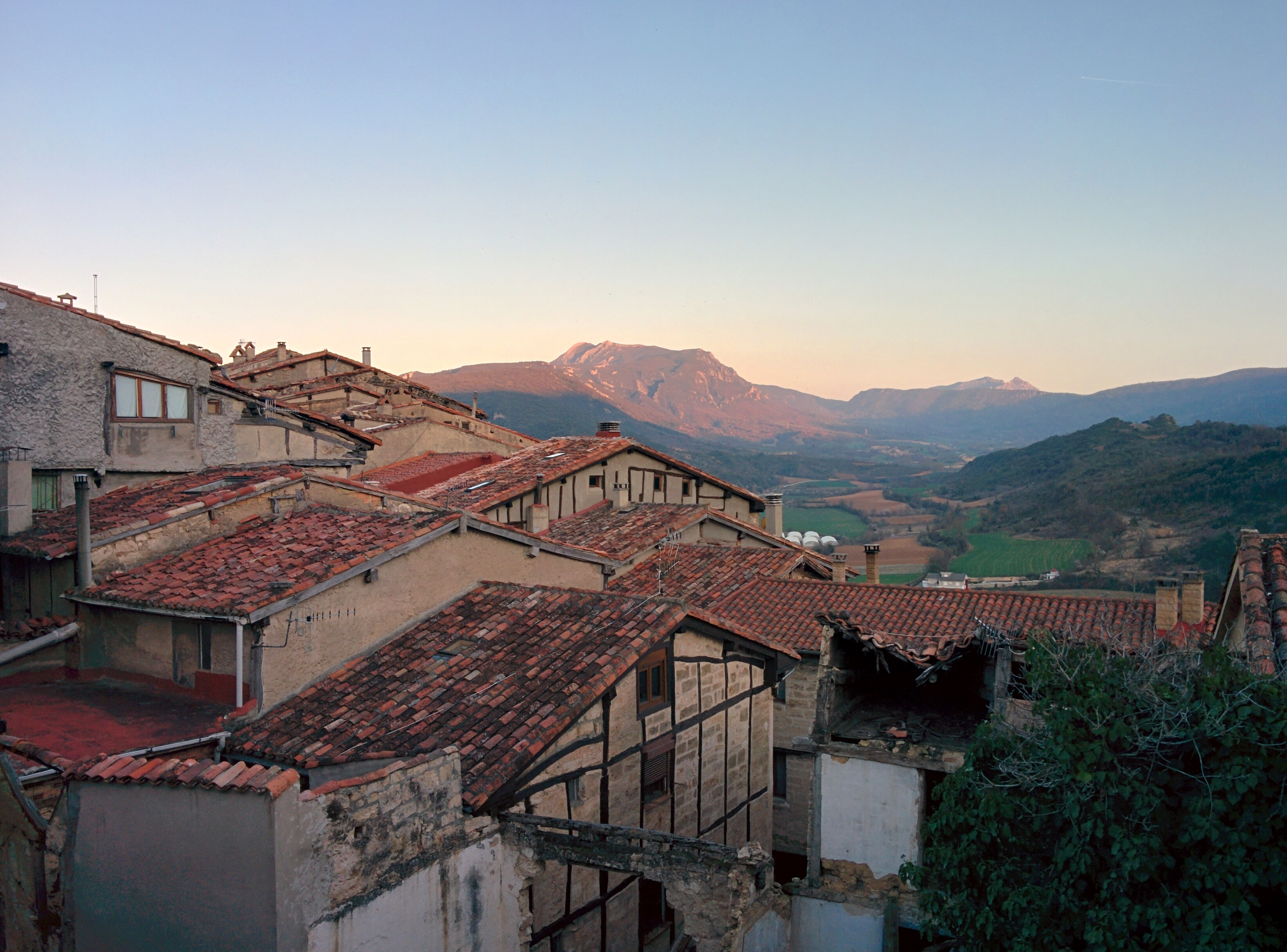 Vista parcial de Frías (Burgos, España). Al fondo, el pico Humión.